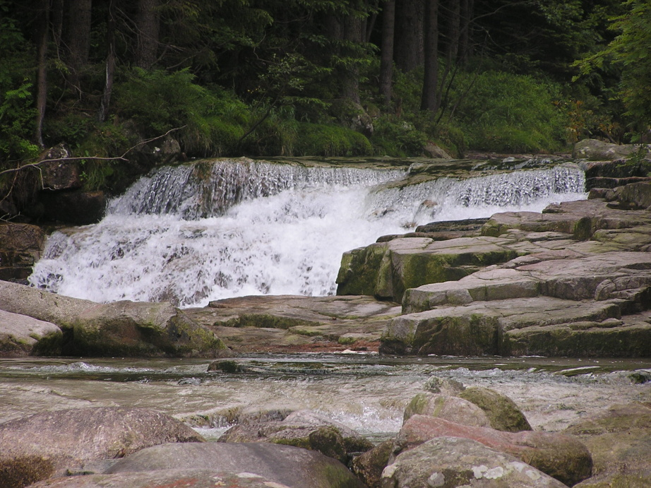 Peřeje Bílého Labe u Weberovy cesty